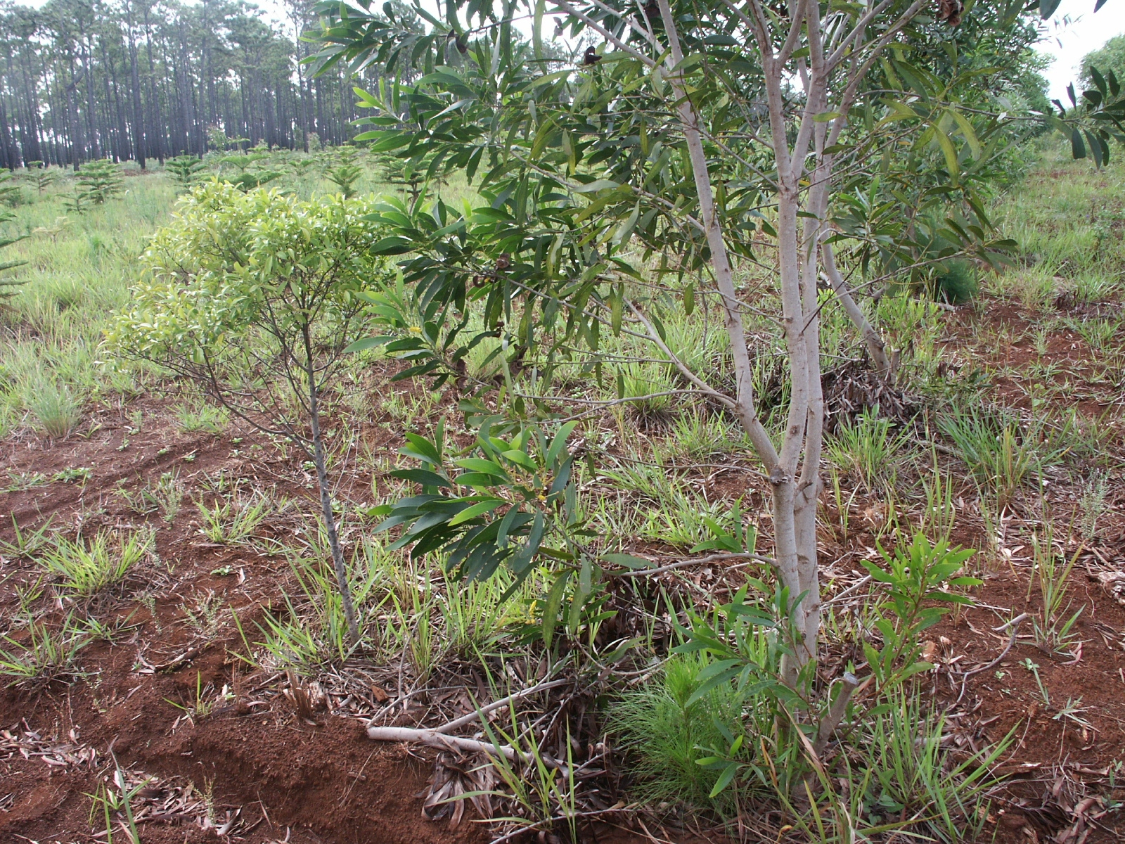 Plantation de santal à l'Ile des Pins. Le santal est à gauche et l'arbre parasité, un faux-gaïac, à droite. Les deux arbres ont été plantés en même temps et ont trois ans. Noter la vigueur du faux-gaïac malgré le parasitisme.